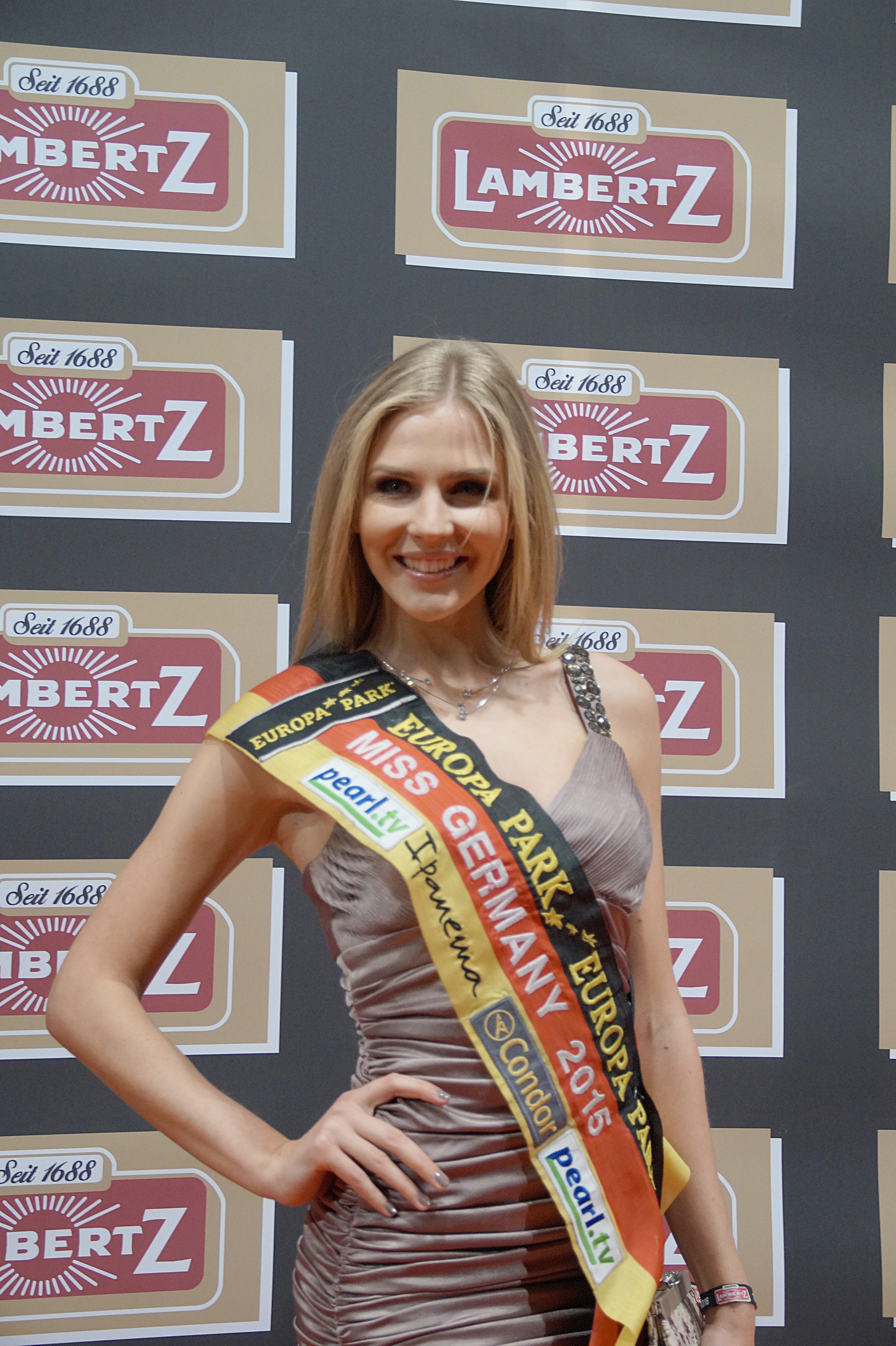 Olga Hoffmann bei der Lambertz Monday Night, im Februar 2016.